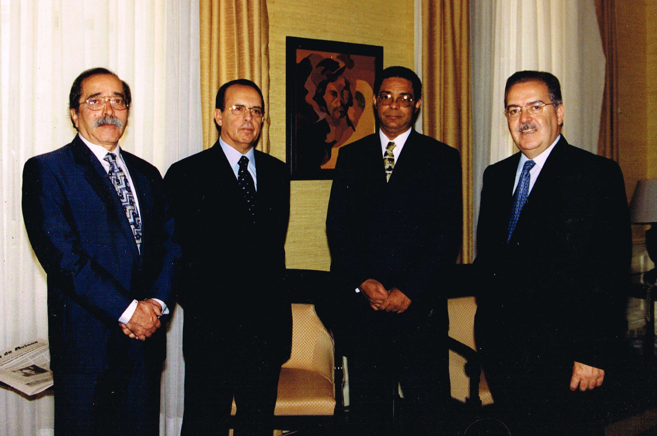 Presidentes de 4 parlamentos da macaronésia